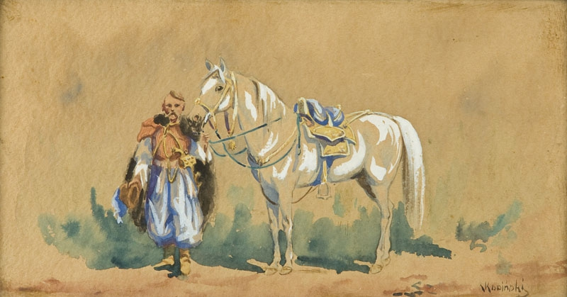 Szlachcic z koniem